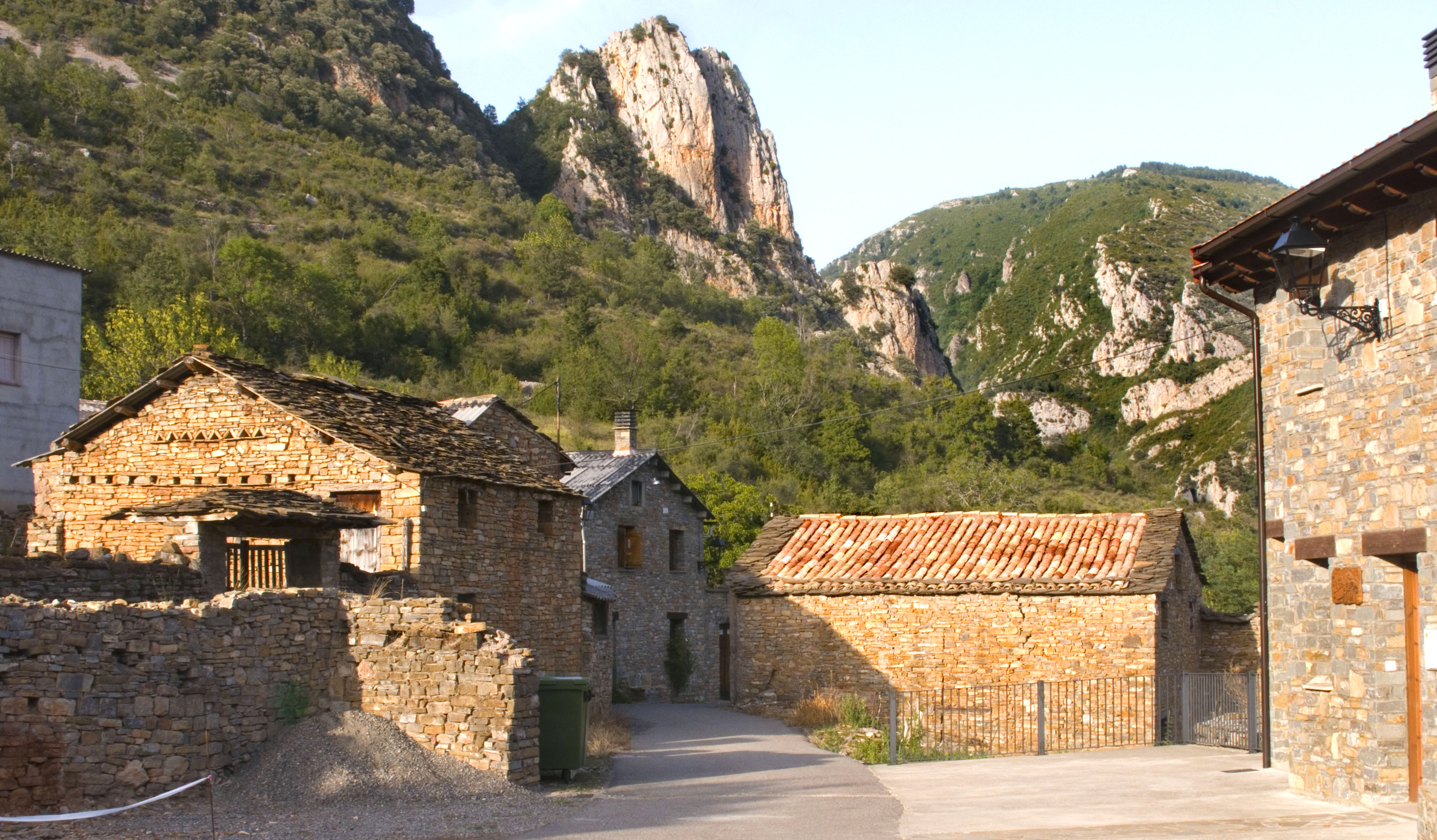 Poble situat al peu de la serra de Vallabriga, dalt del monestir d'Ovarra. Pertany al municipi de Beranui de la Baixa Ribagorça-Franja de Ponent.